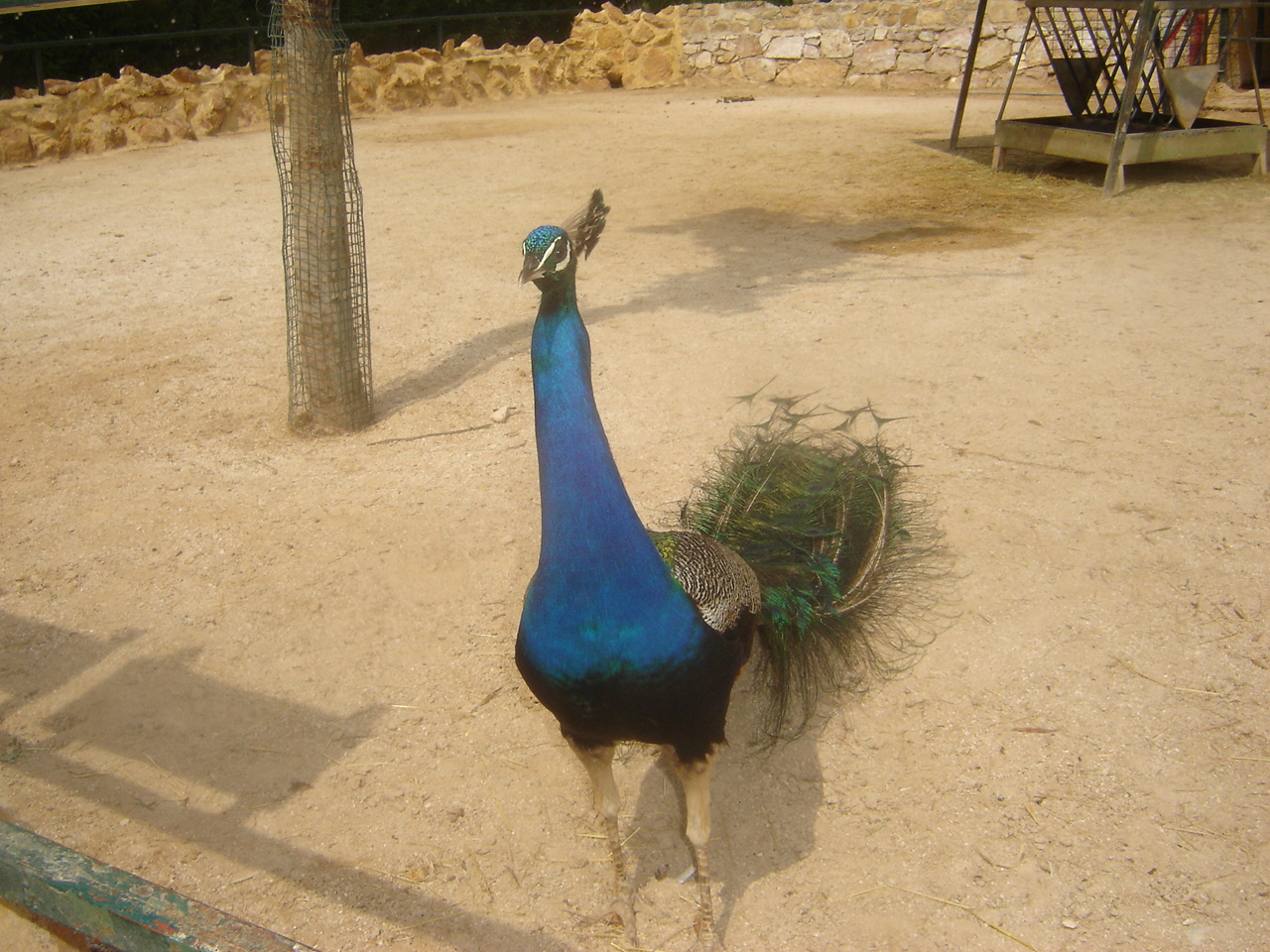 Αρσενικό παγώνι